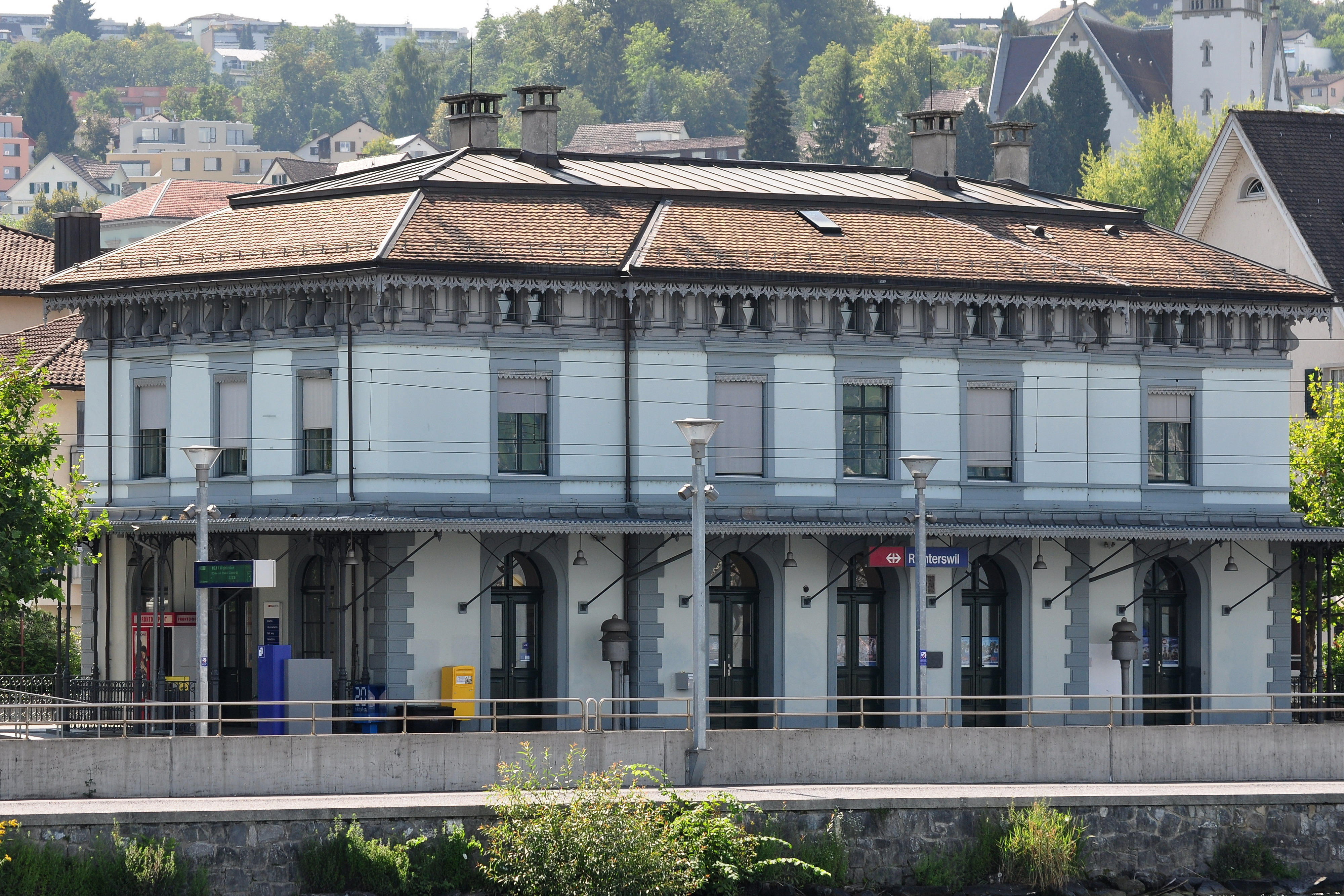 Bahnhof in Richterswil (Switzerland) as seen from Zürichsee-Schifffahrtsgesellschaft (ZSG) motorship Helvetia